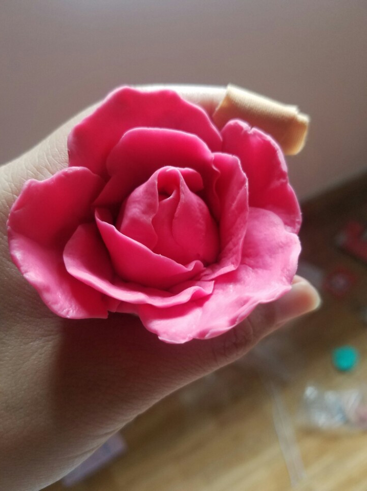 hoa đất sét nhật tự khô